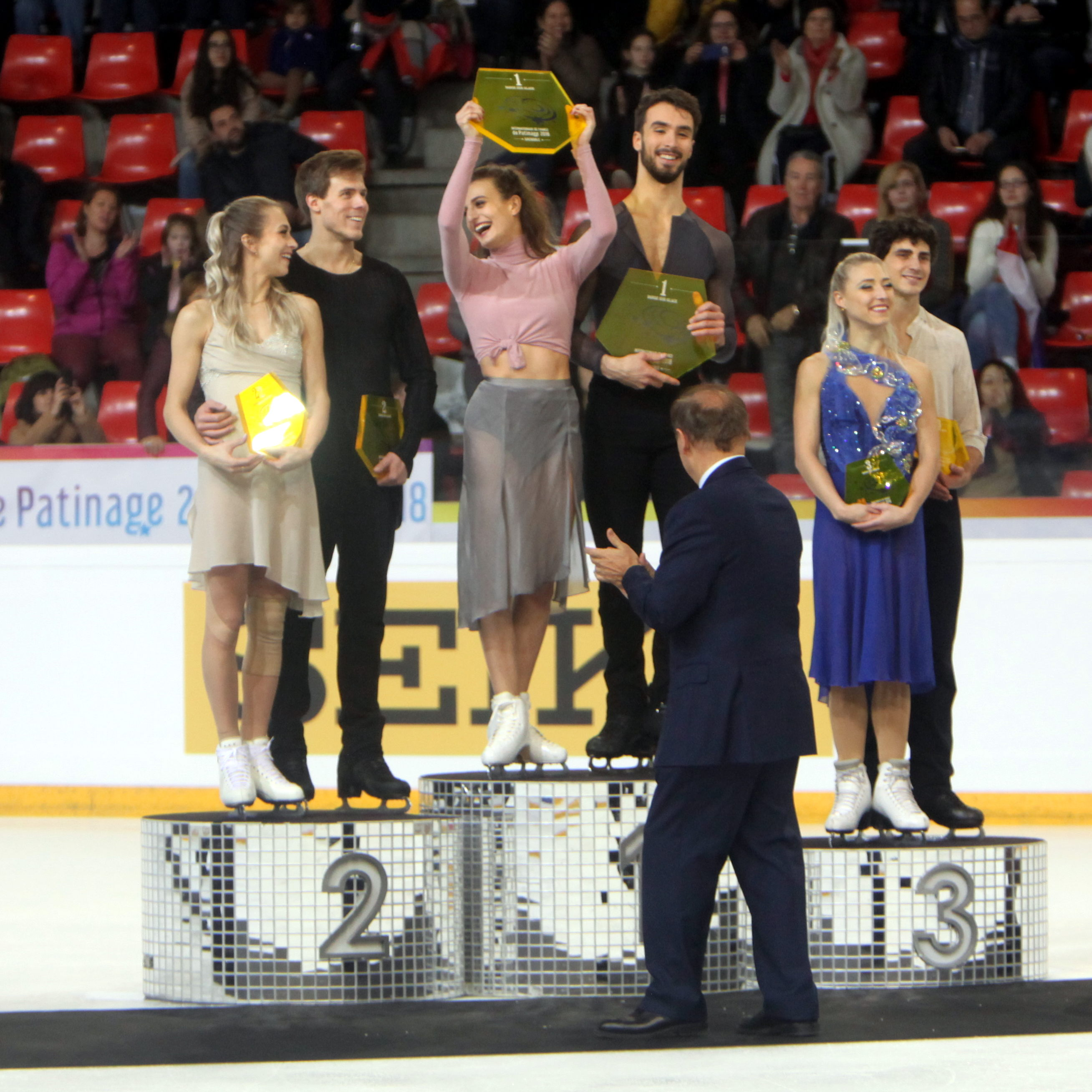 Internationaux de France de Patinage 2018, Ice Dance.